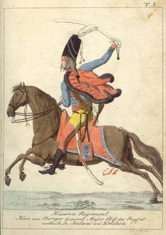 Dänscihes Husarenkorps, GM Valentin von Berger um 1795, by Friedrich Ludwig von Köller. Aus dessen Werk Vorstellung_der_sämtlichen_Königl._Dänischen_Armee